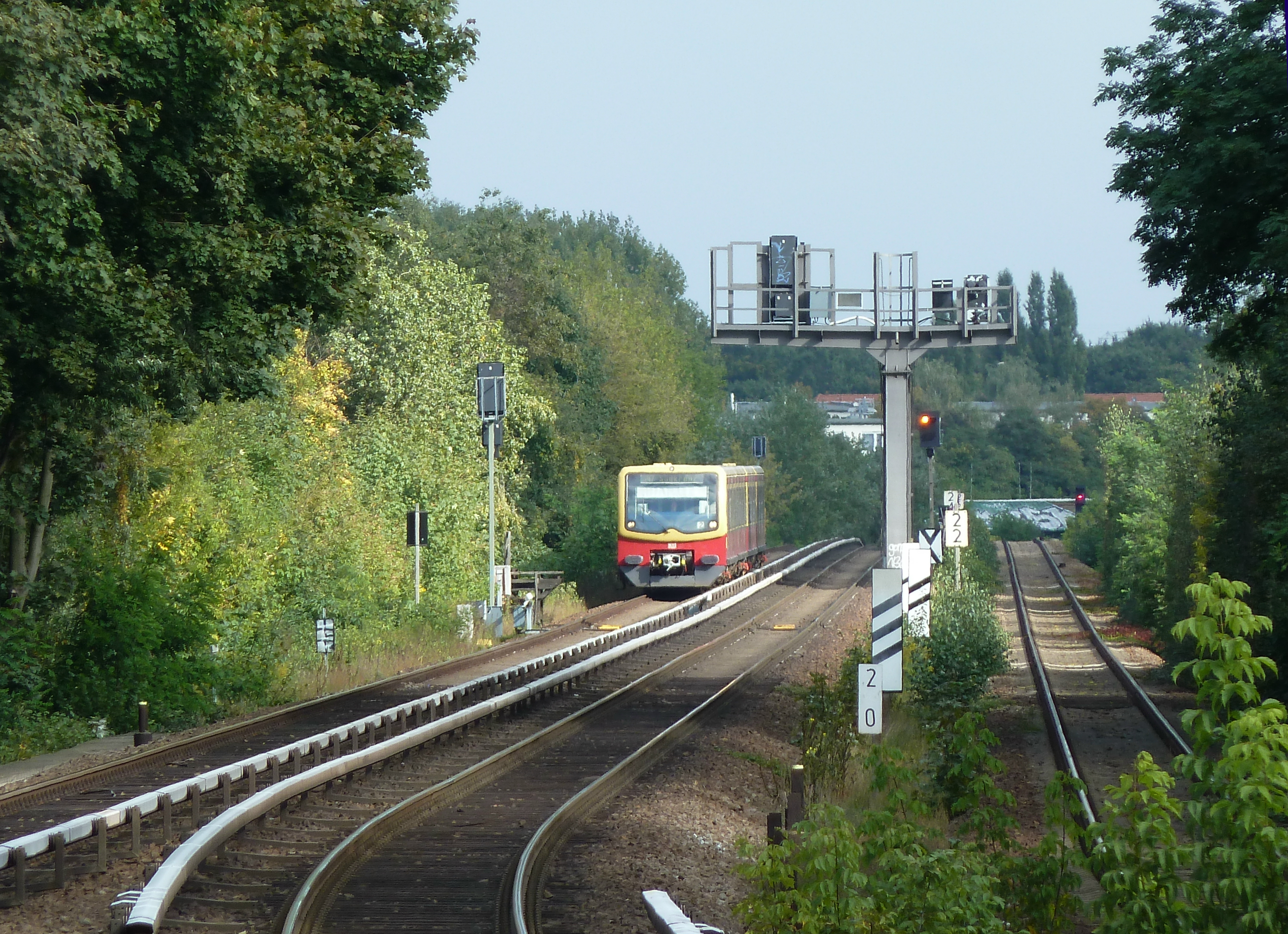 S-Bahnzug der Baureihe 481 nahe der Station Köllnische Heide von Baumschulenweg herkommend am 01.Oktober 2010